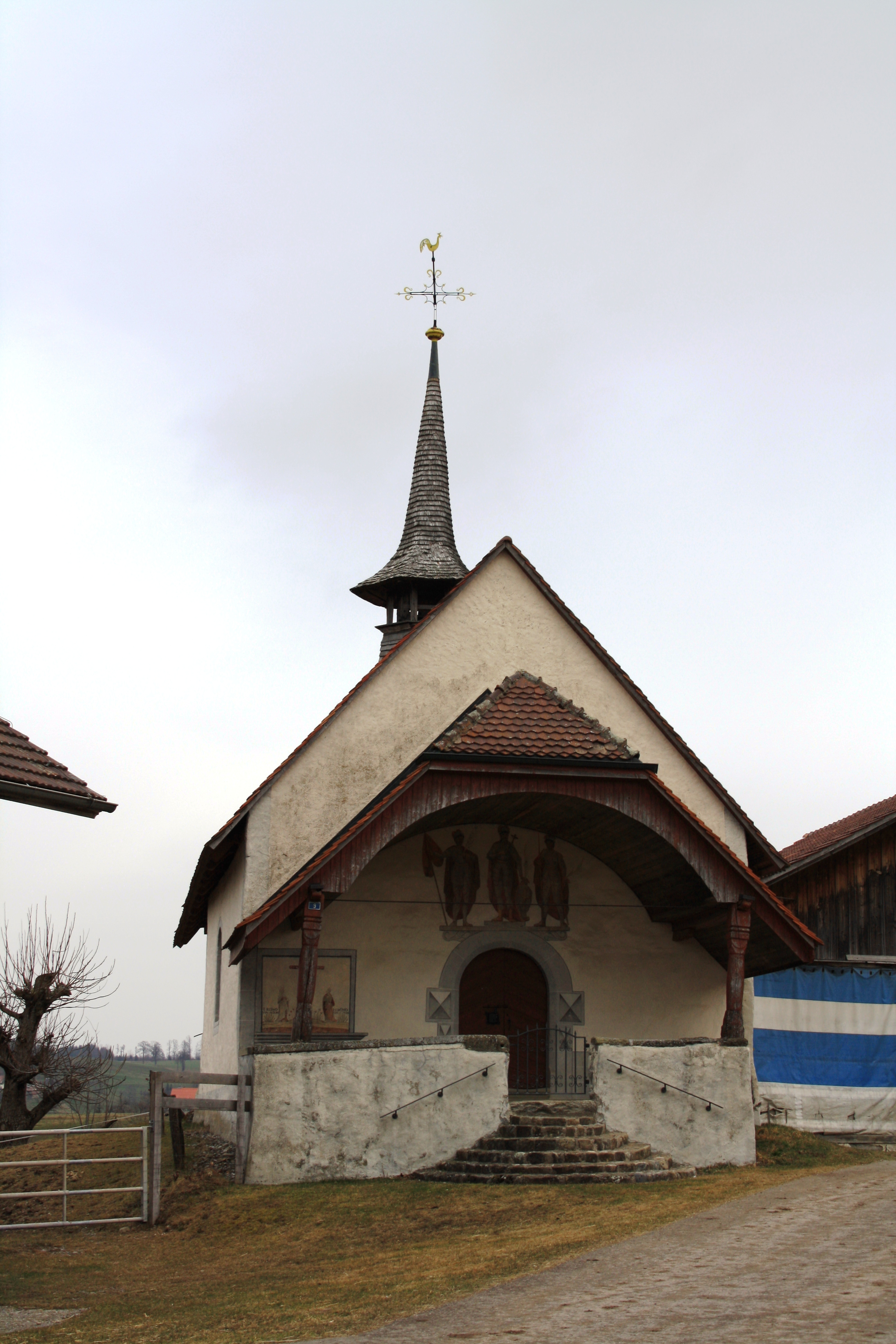 St. Ursuskapelle, St. Ursen, Kanton Freiburg, Schweiz